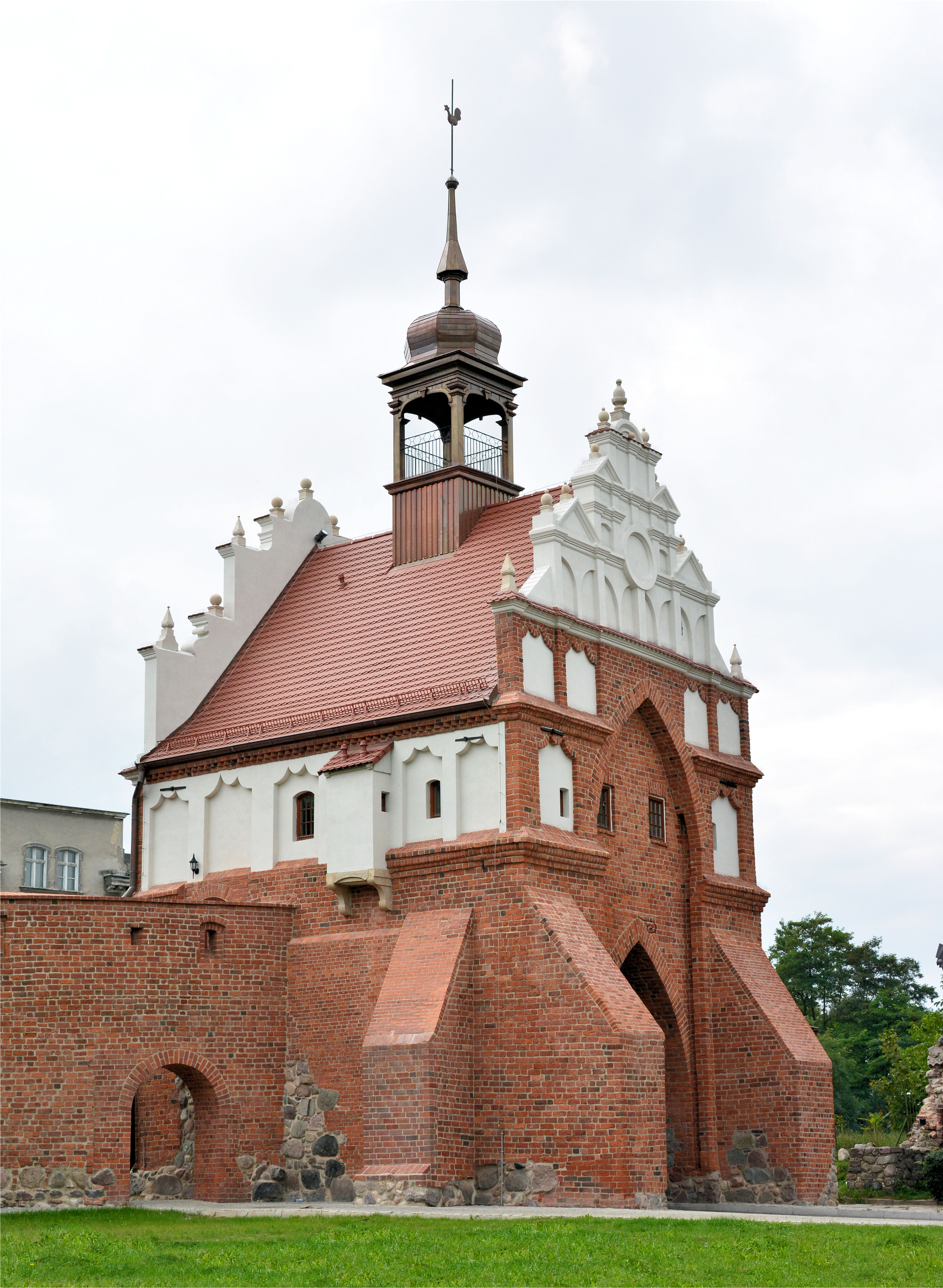 Stargard Szczeciński, Brama Wałowa, 1430, XVI